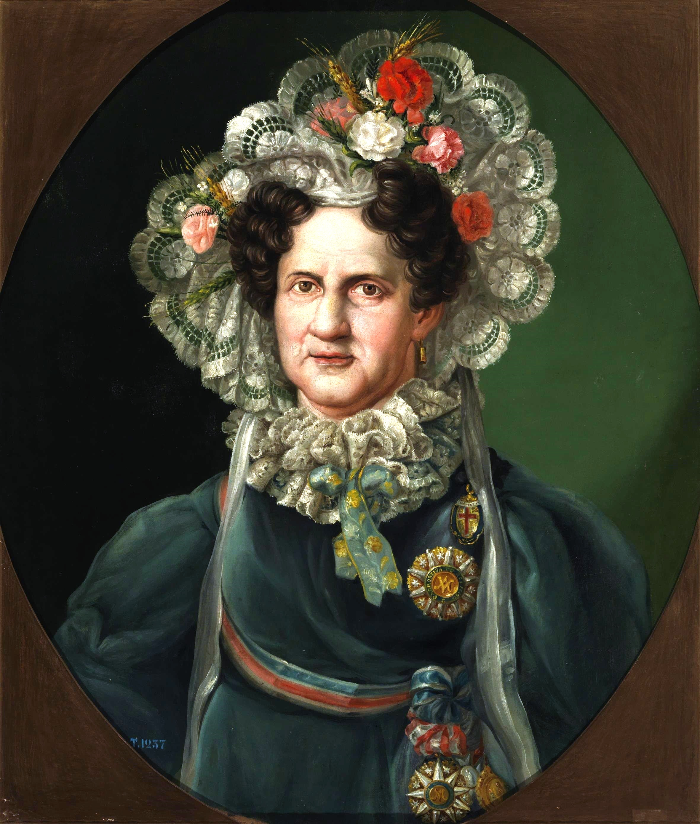 Retrato de la reina Carlota Joaquina de Borbón (1775-1830), que fue hija del rey Carlos IV de España y de la reina María Luisa de Parma y reina consorte de Portugal por su matrimonio con el rey Juan VI de Portugal.